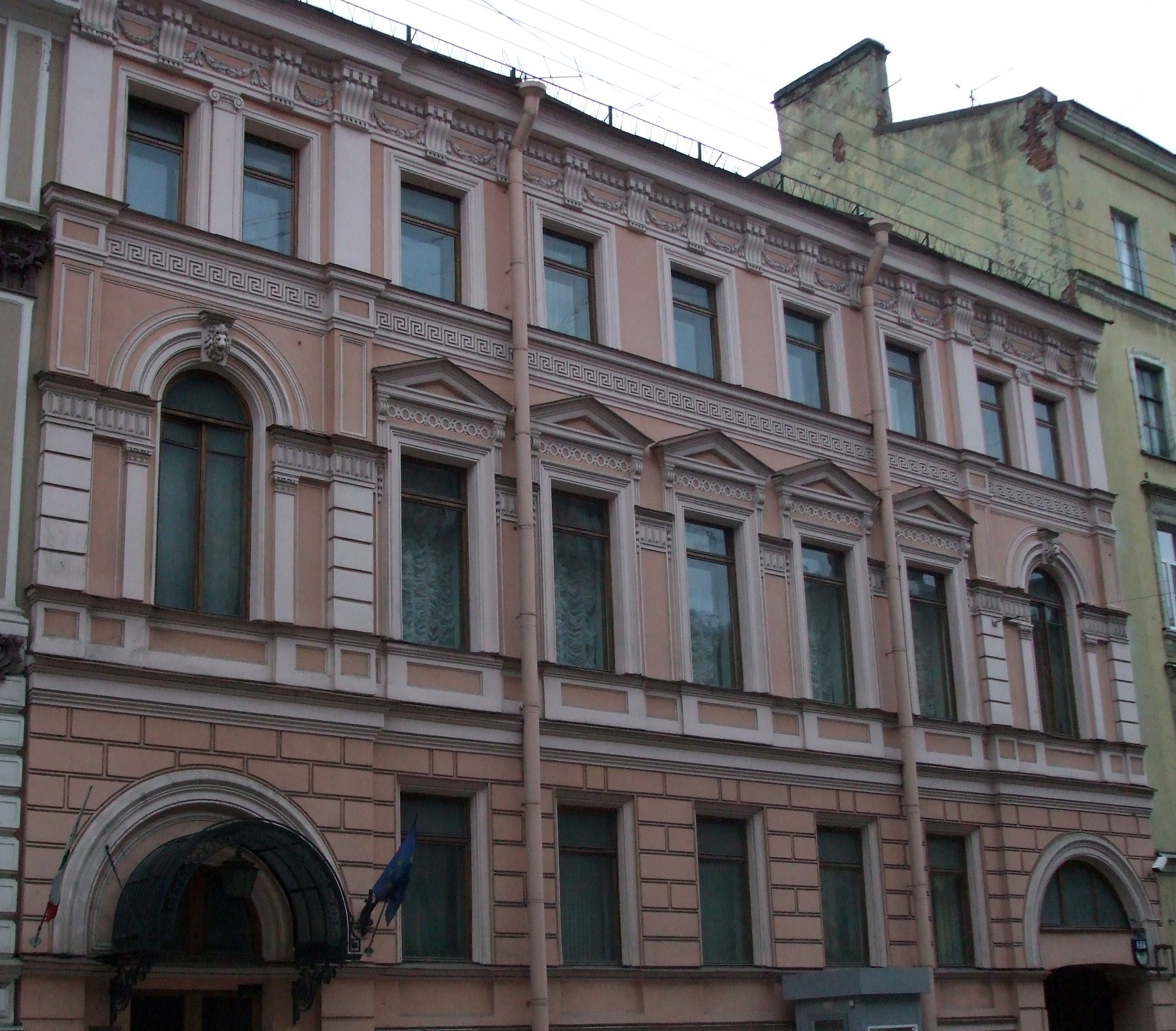 Bulgarian consulate in Saint Petersburg